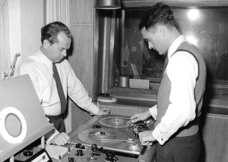 Funkhaus Köln: Toningenieure beim "Cuttern" einer Sendung im Tonträger